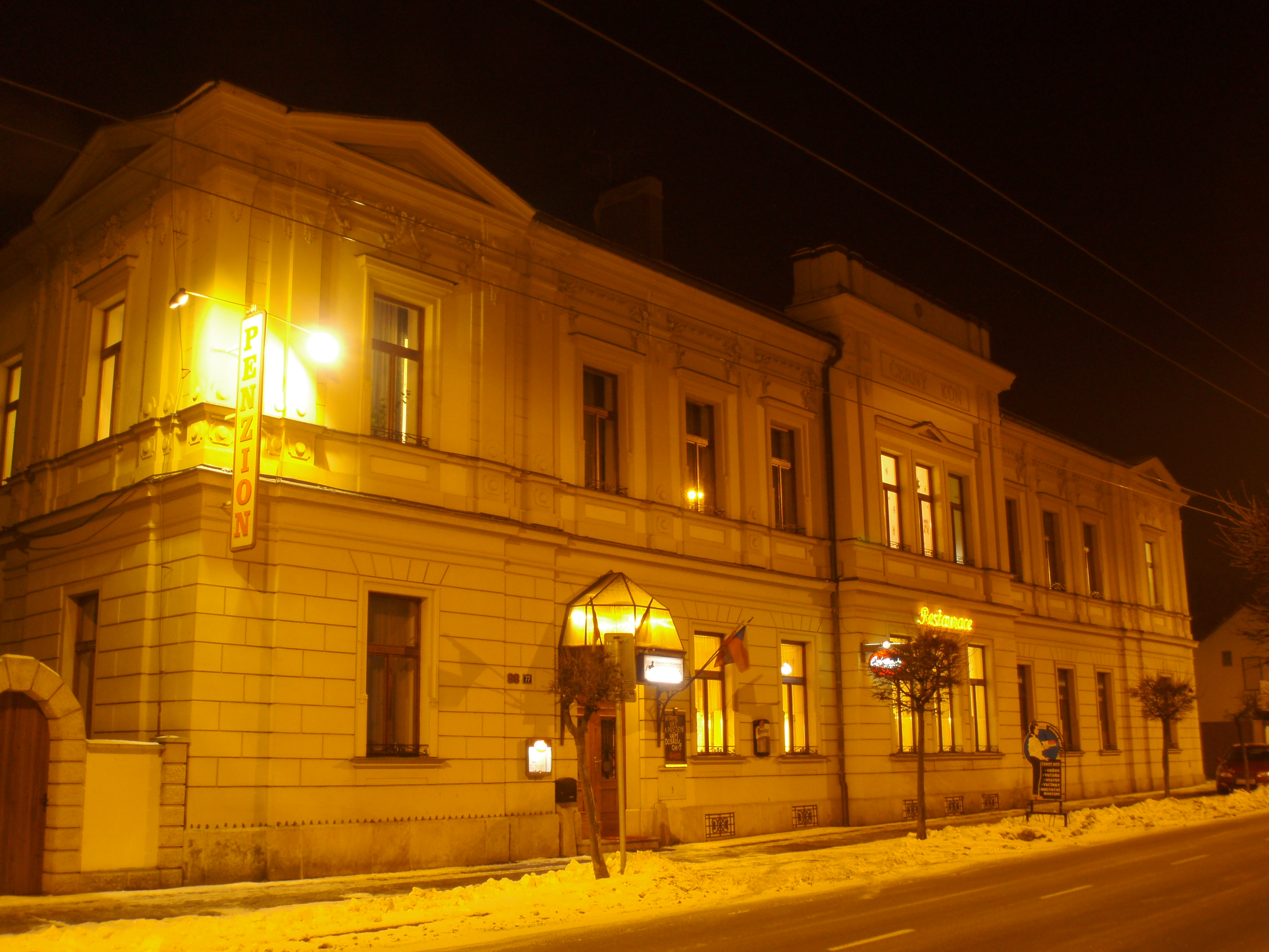 Penzion Černý kůň